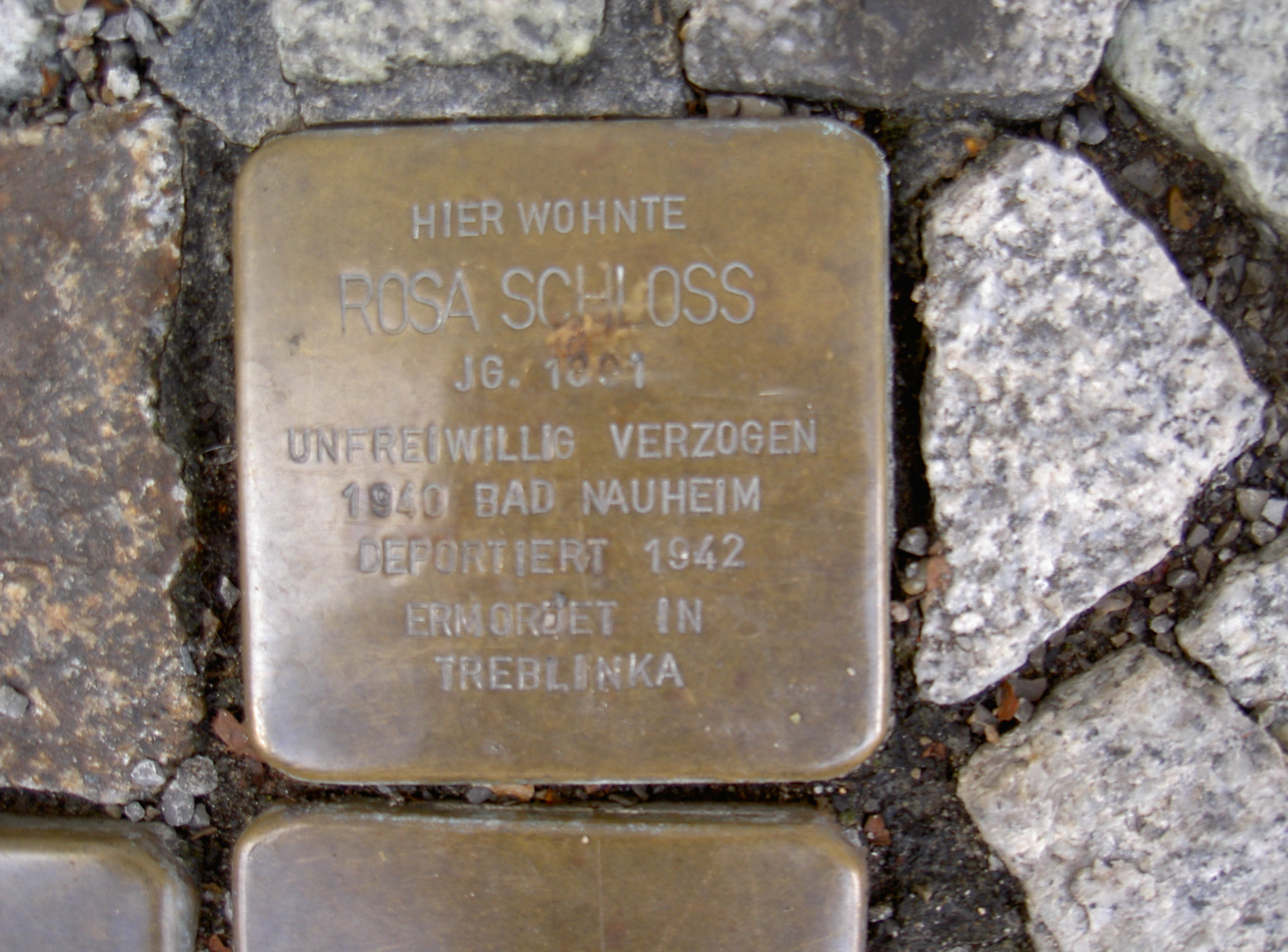 Stolperstein in Themar Markt 8 Schloss Rosa